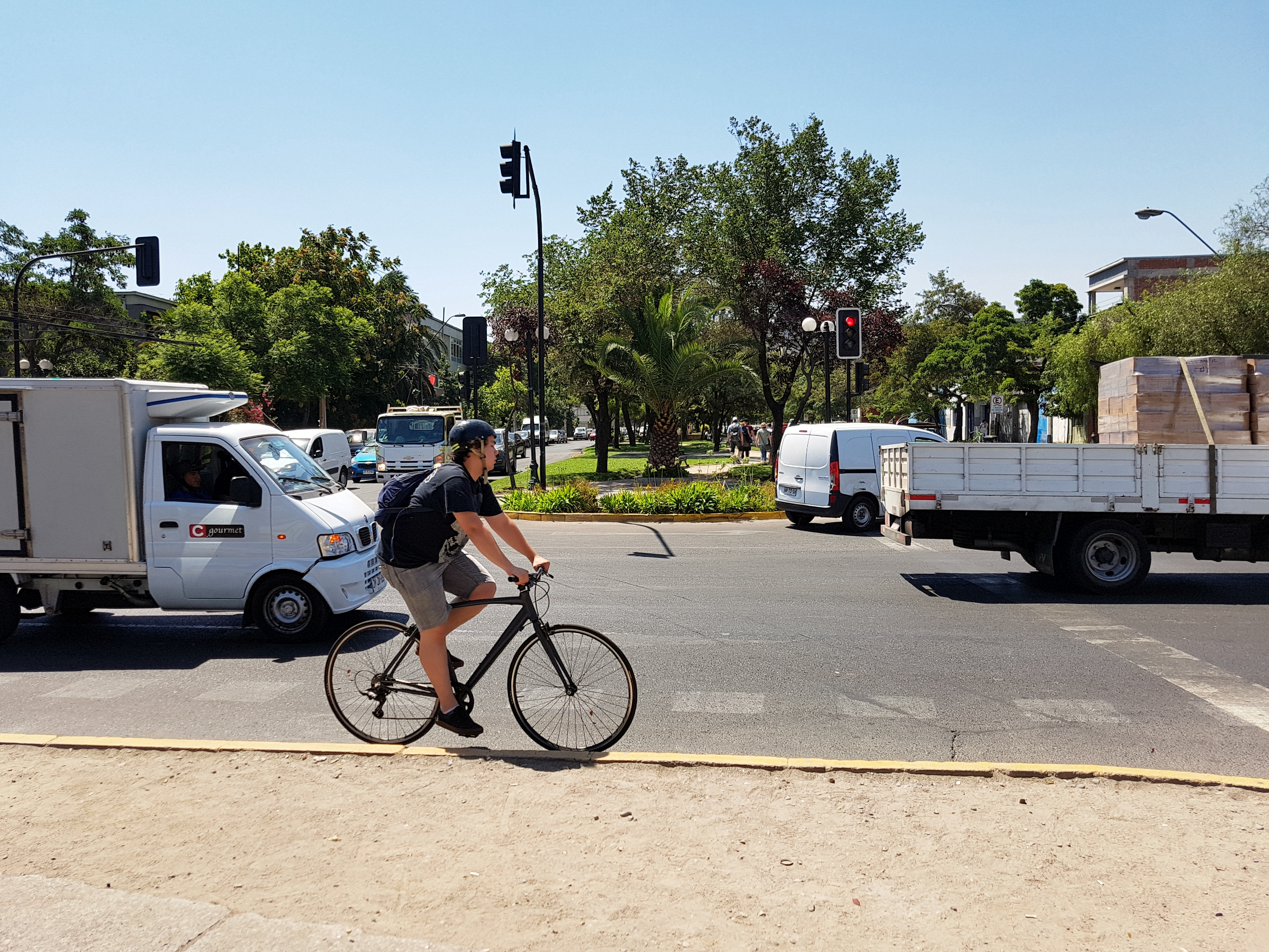 La avenida Bustamante en la intersección con Santa Isabel; foto tomada hacia el norte desde el bandejón central de Bustamante; comuna de Providencia, Santiago de Chile.